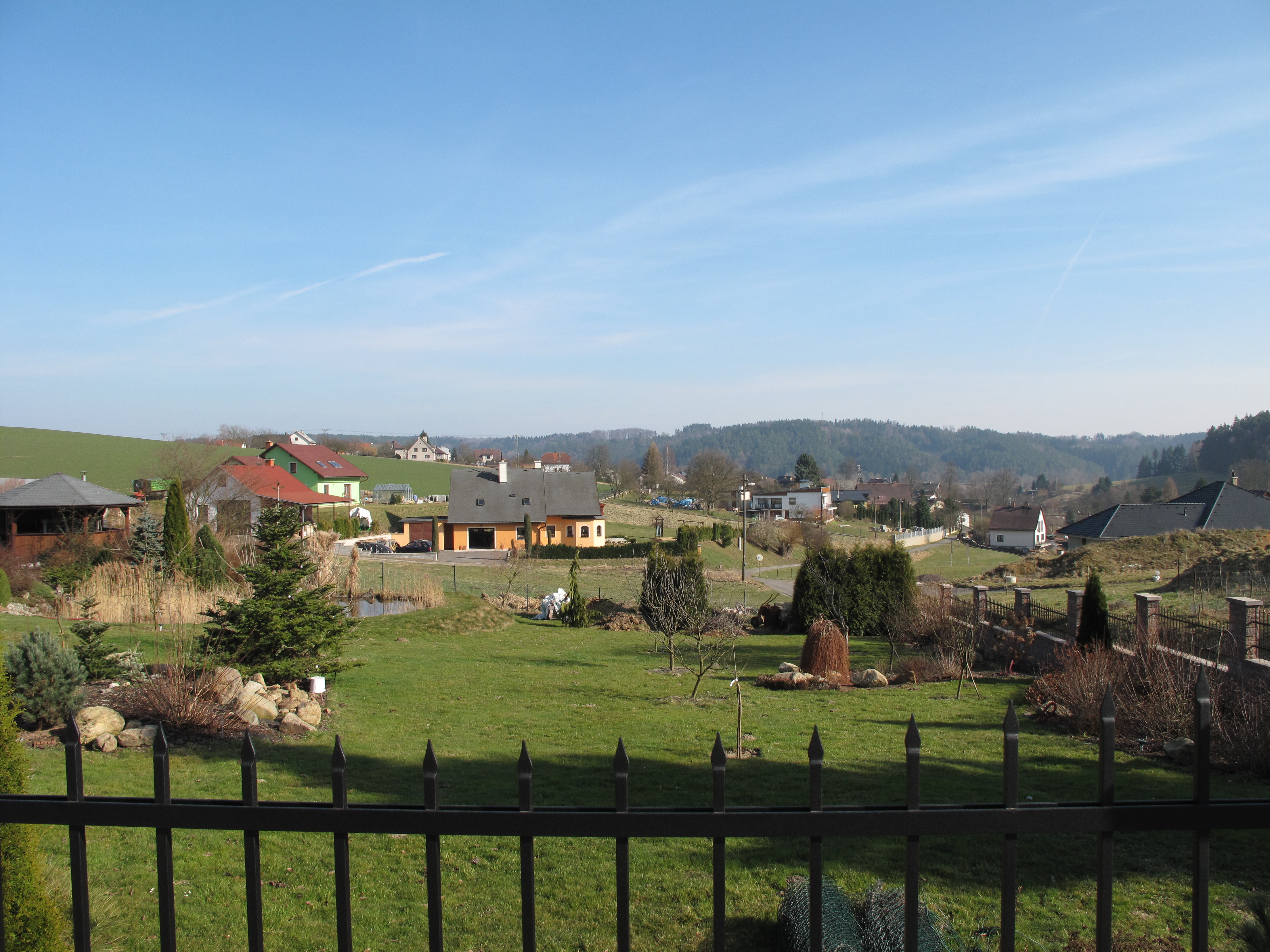 Zahrady v Kněžičkách. Okres Liberec, Česká republika.